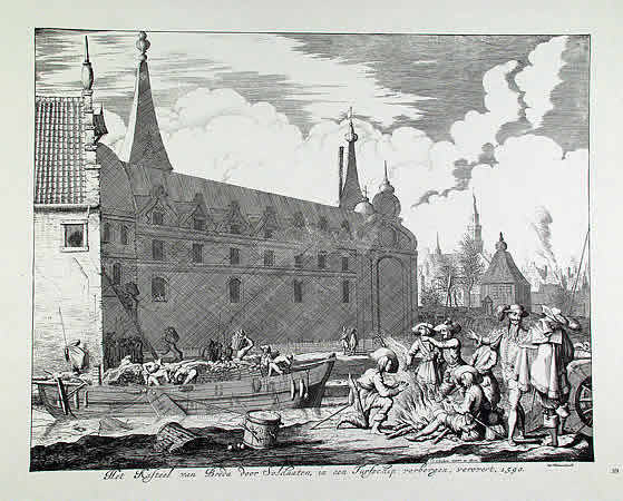 Een prent van Jan Luyken waarop het lossen van het schip aan de noordzijde van het paleis te zien is. Rechts achter een van de twee geschutstorens die vanaf 1610 de waterpoort, het Spanjaardsgat, zouden flankeren